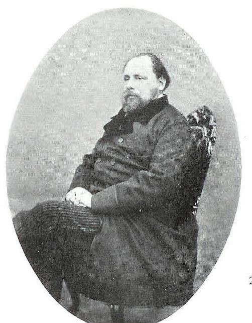 Foto van de Nederlandse koning Willem III (overleden 1890); foto gemaakt omstreeks 1865.